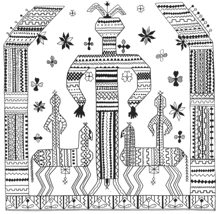 Прорисовка вышивки с Русского Севера (XIX век). Интерпретируется некоторыми исследователями как изображение Богини-Матери. Оригинал: Makosh-XIX.gif